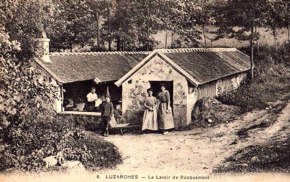 Le lavoir de Roquemont à l'ouest du Luzarches, à l'écart du bourg. Ici se trouvait l'unique source d'eau potable dont pouvaient disposer les habitants durant tout le XIXe siècle.